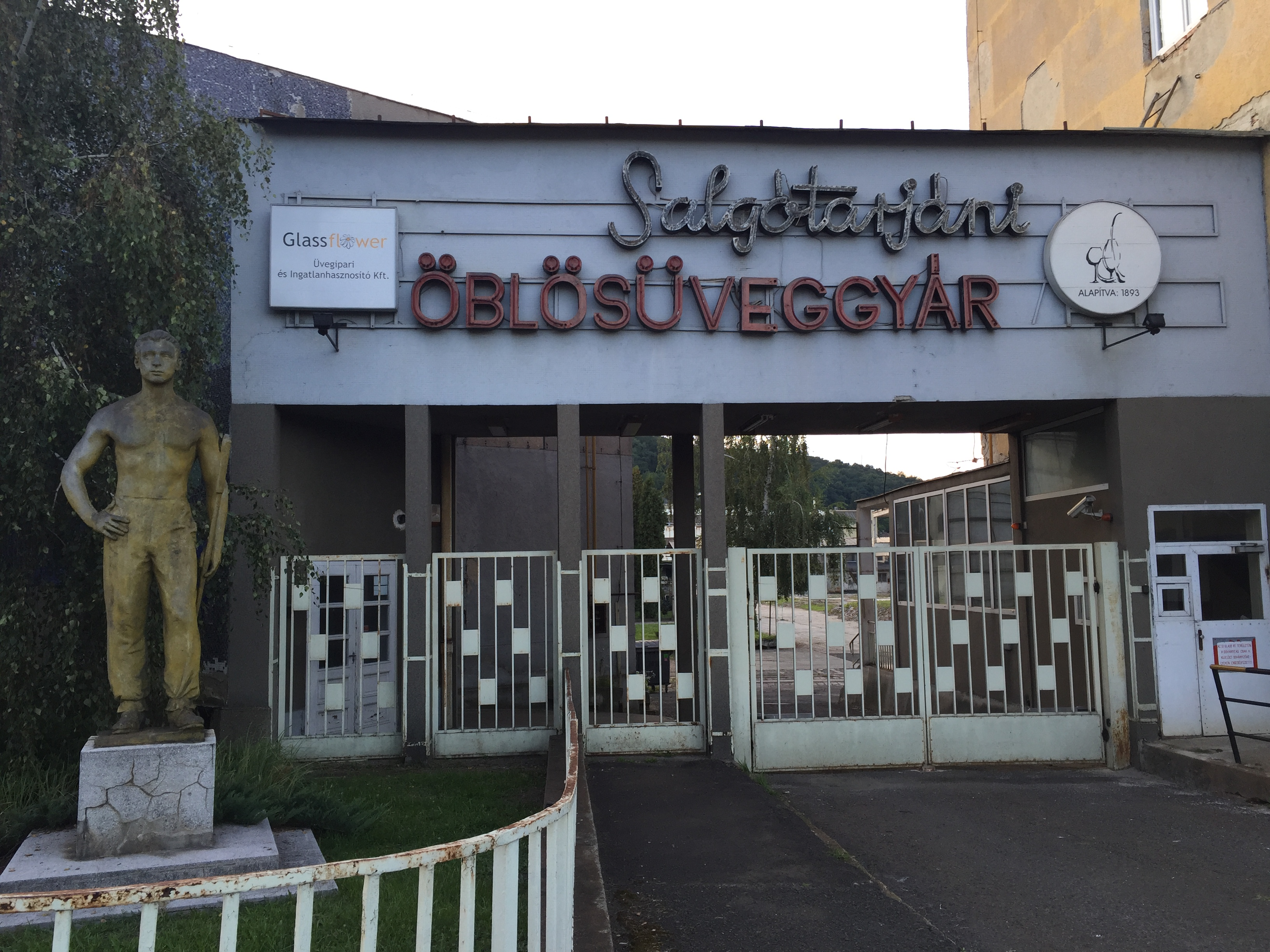 Salgótarján Öblösüveggyár